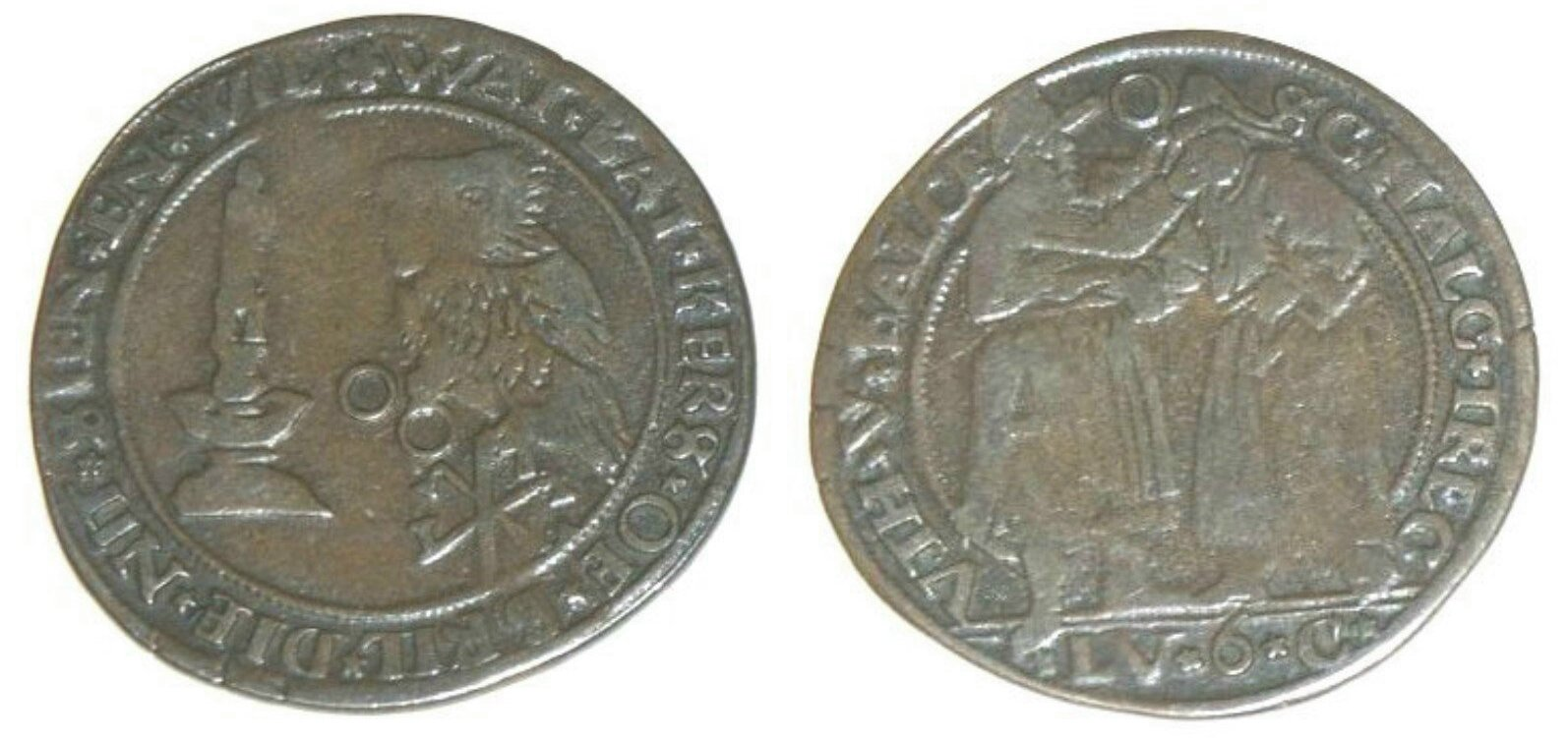 Rekenpenning Dordrecht 1553 op de strijd tussen Calvijn en Servet. Foto van eigen exemplaar.